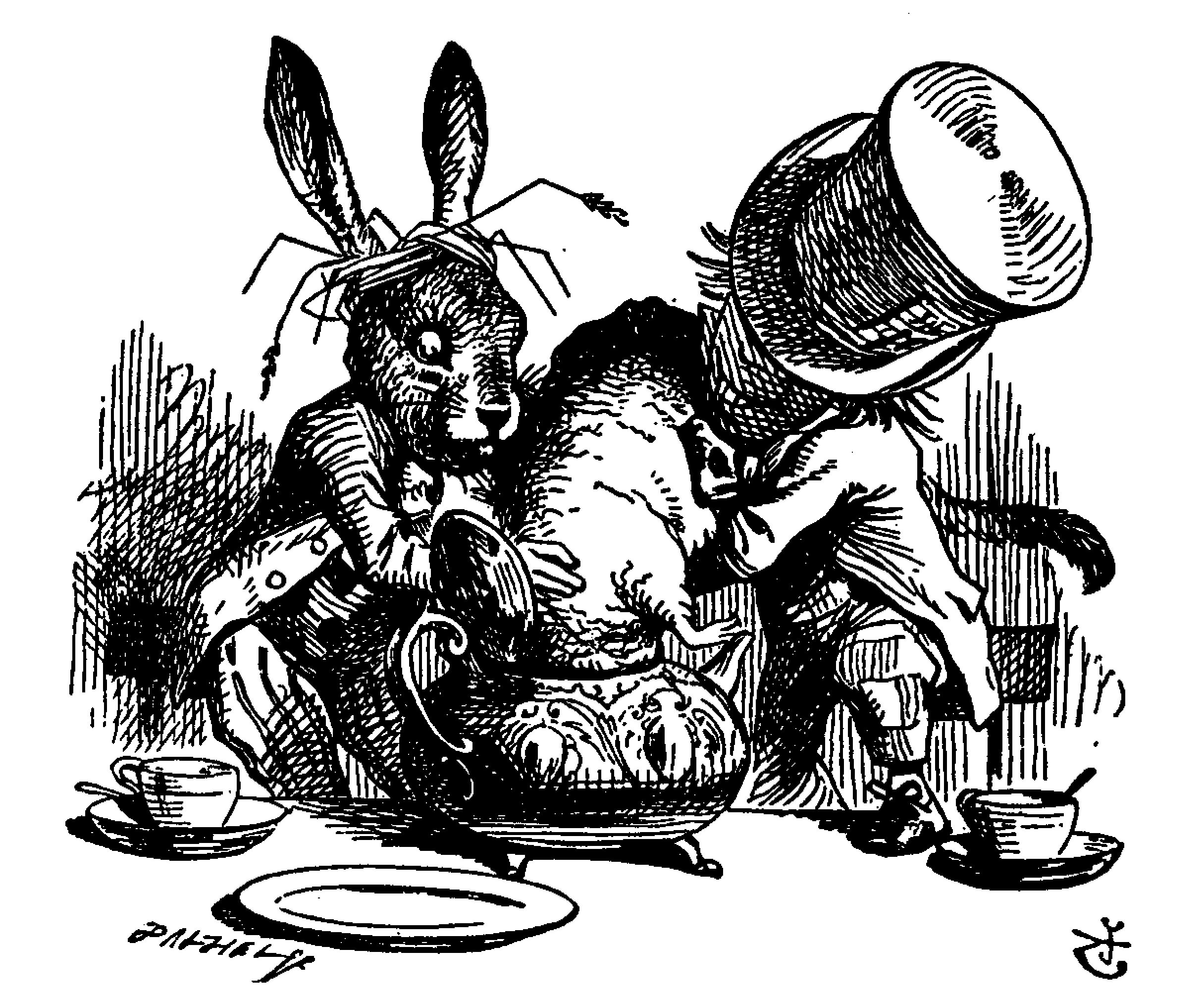 Alice’s Abenteuer im Wunderland Übersetzer: Antonie Zimmermann Orginal Titel: Alice's Adventures in Wonderland Illustrationen: John Tenniel